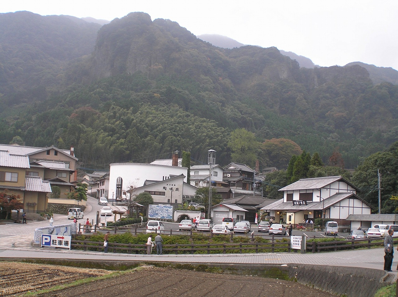 大川内山（おおかわちやま、佐賀県伊万里市)鍋島焼